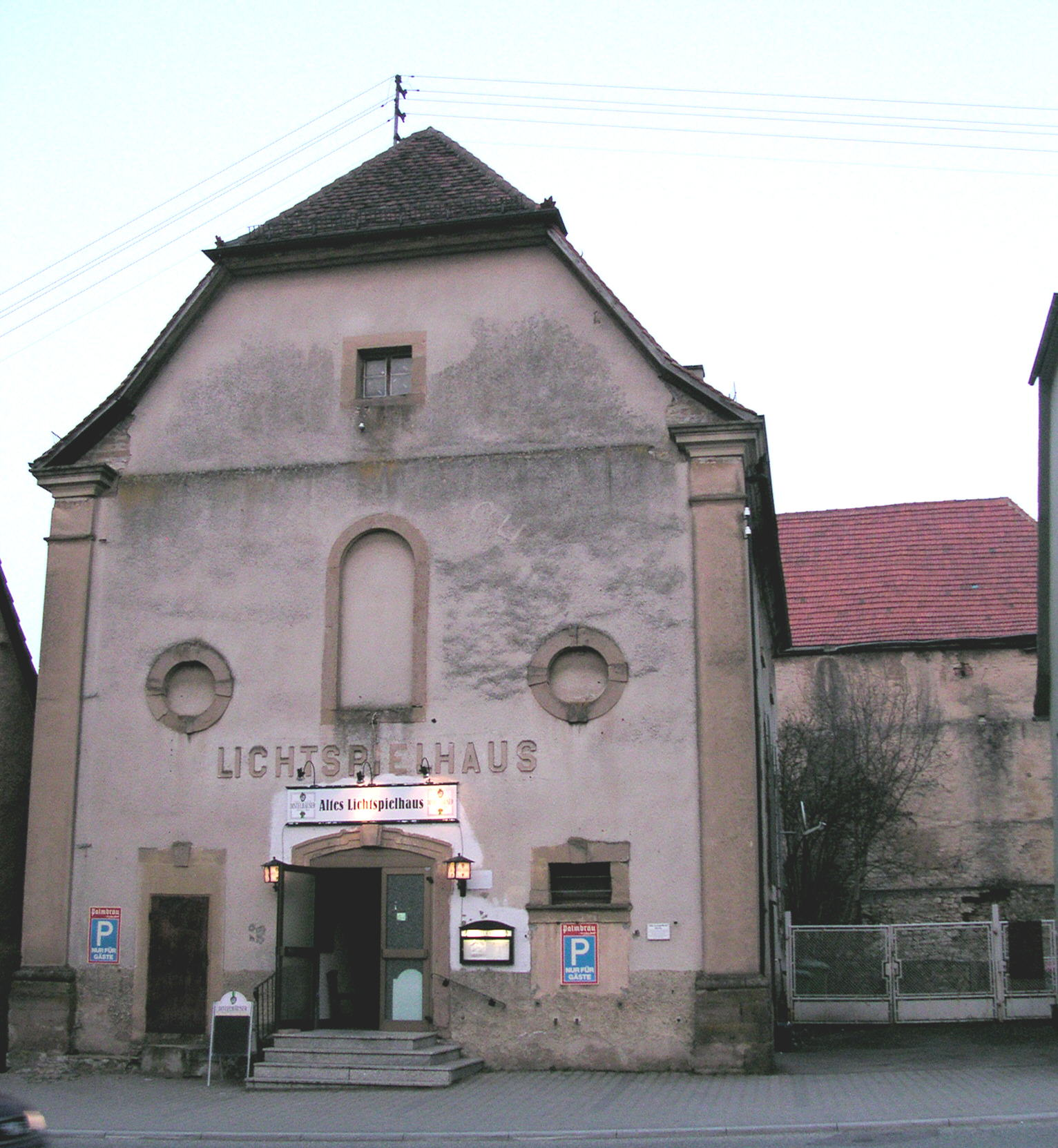 altes Lichtspielhaus von Sinsheim-Steinsfurt